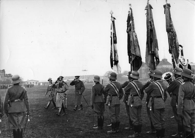 Berlin, Vereidigung von Rekruten Scherl Bilderdienst Die neuen Rekruten, Jahrgang 1914, werden vereidigt. 7.11.1935 U.B.z. den Oberfehlshaber des Heeres, General der Artillerie, Freiherr von Fritsch und Generaloberst a.D. von Seeckt beim Abschreiten der Front auf dem Exerzierplatz der Kaserne in Ruhleben bei Berlin. 36139-35 Abgebildete Personen: Fritsch, Werner von Freiherr: Generaloberst, Oberbefehlshaber des Heeres, Deutschland Seeckt, Hans von: MdR, Generaloberst, Chef der Heeresleitung, Orden Pour le mérite, Deutschland